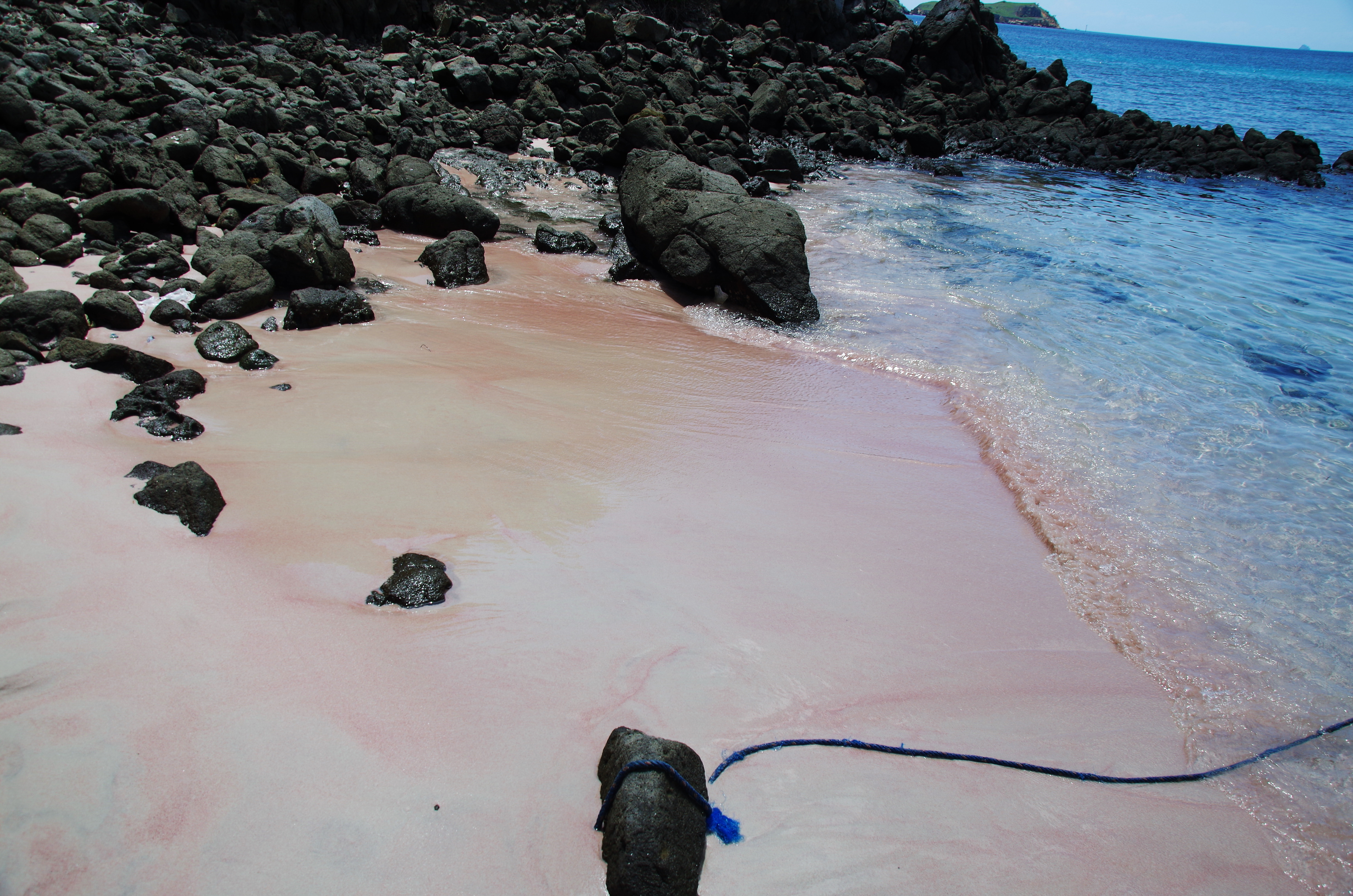 Komodo pink beach